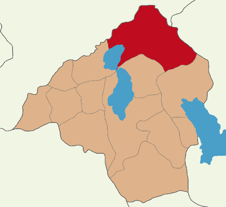 Yalvaç ilçesinin konumu